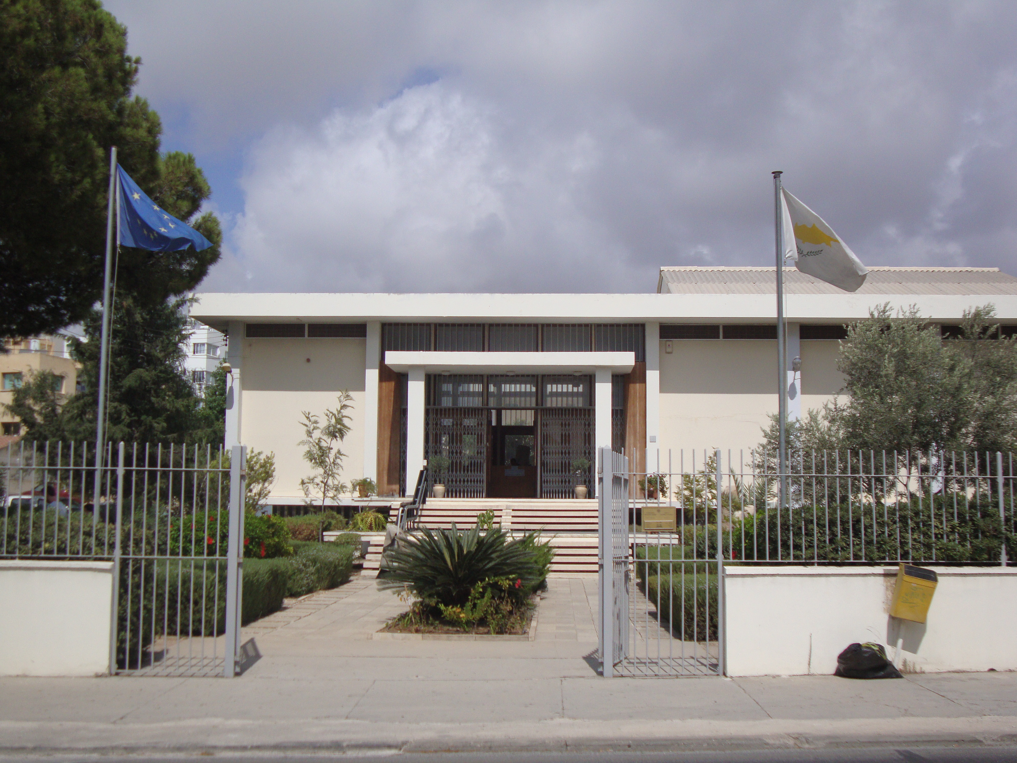 Археологический музей Пафоса (09.2013)